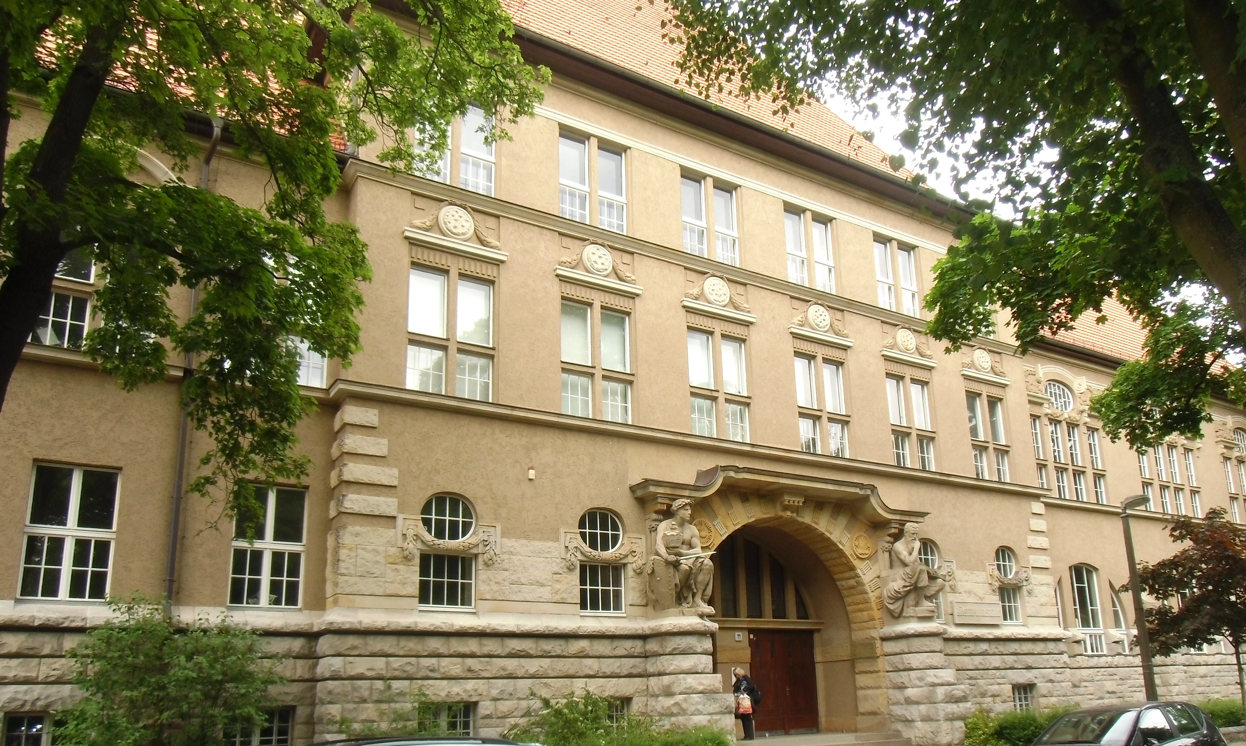 Denkmalgeschütztes Gebäude des früheren Realgymnsiums,jetzt Wilhelm-Bölsche-Schule, erbaut 1905